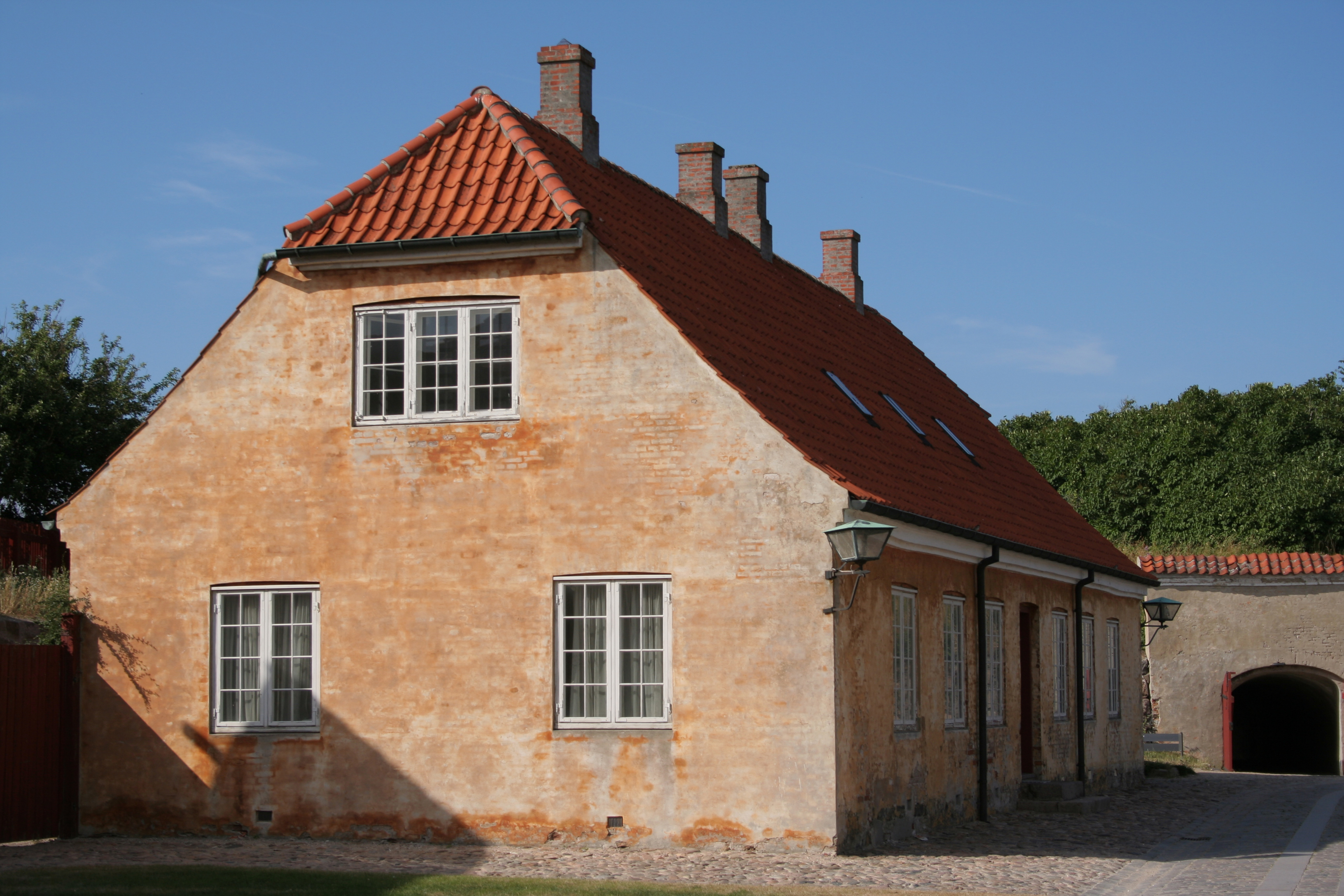 Annexgebäude des Schlosses Kronborg in Helsingør, Dänemark